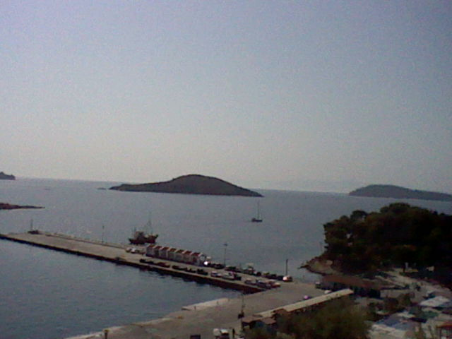 Η νησίδα Μαραγκός.